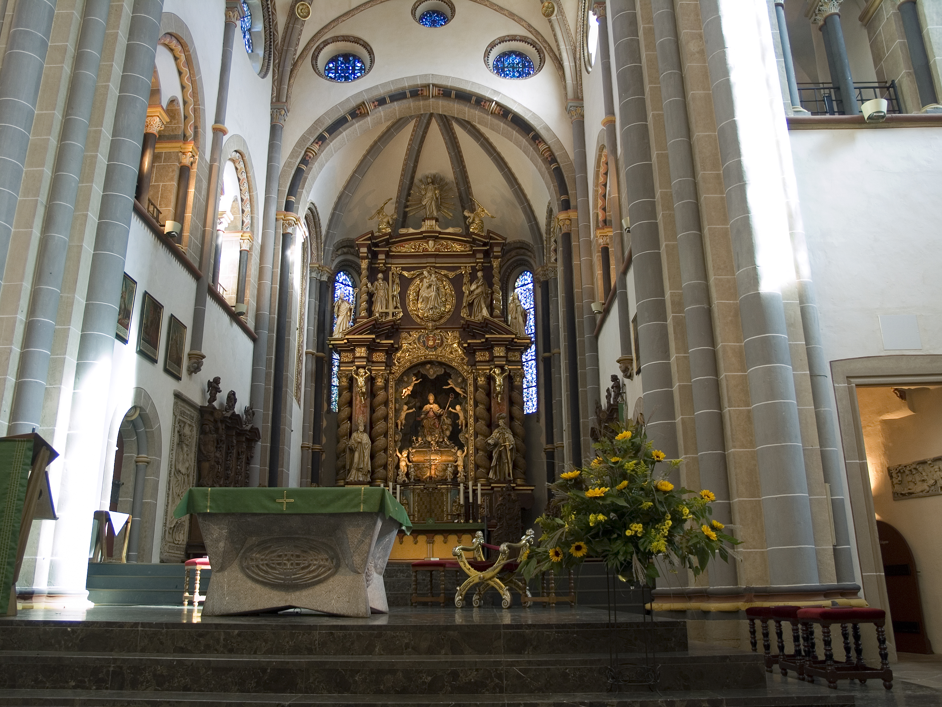 Северный Рейн-Вестфалия, Эссен, Верден - Верденское аббатство, церковь Святого Людгера